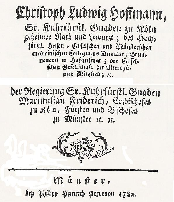 Titelblatt der Veröffentlichung von Christoph Ludwig Hoffmann, in welcher er von seiner Erfindung, der Telegraphie, berichtet